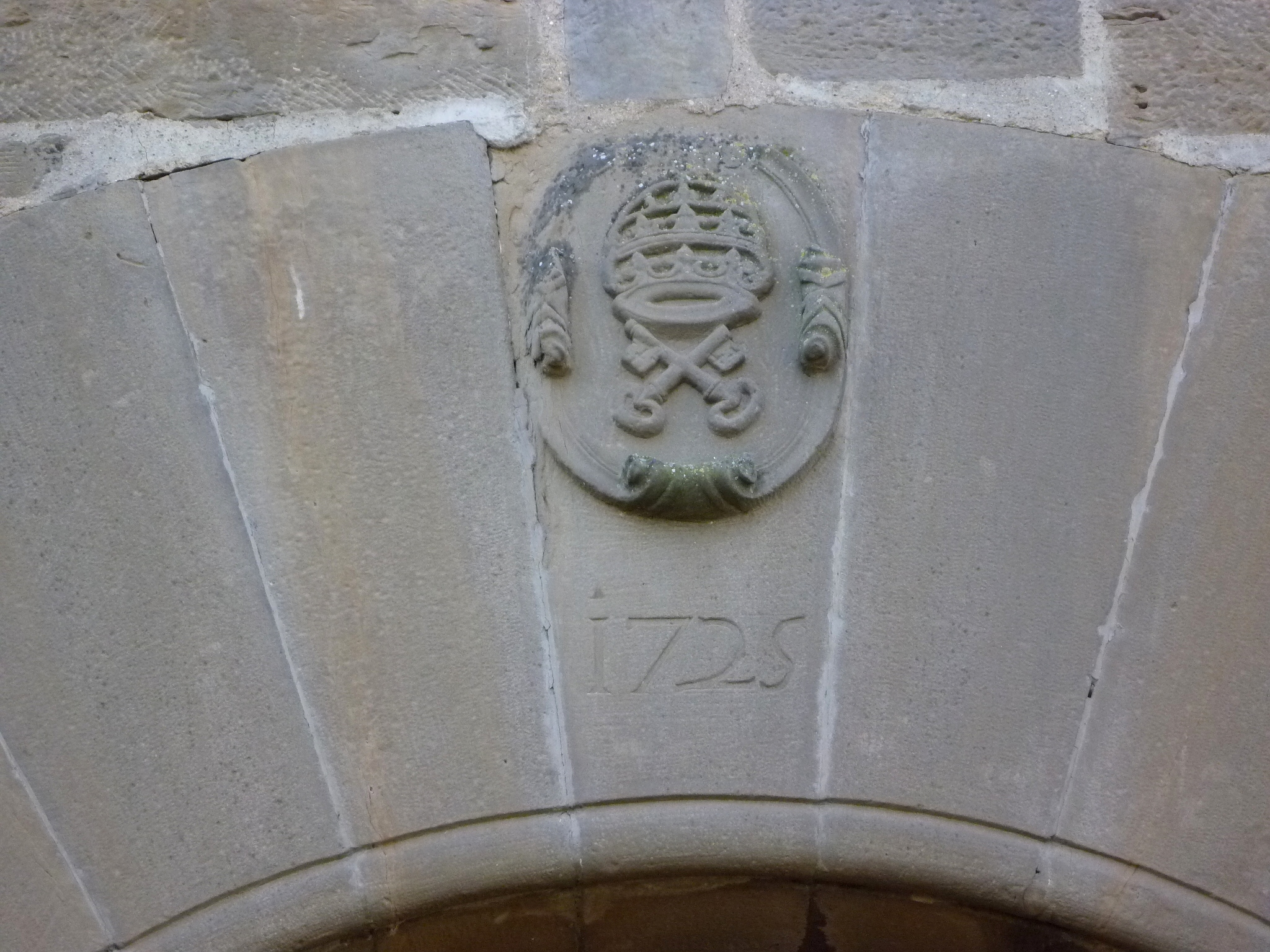 Ermita de Sant Pere dels Pastors de Guissona: escut al portal amb els atributs de Sant Pere